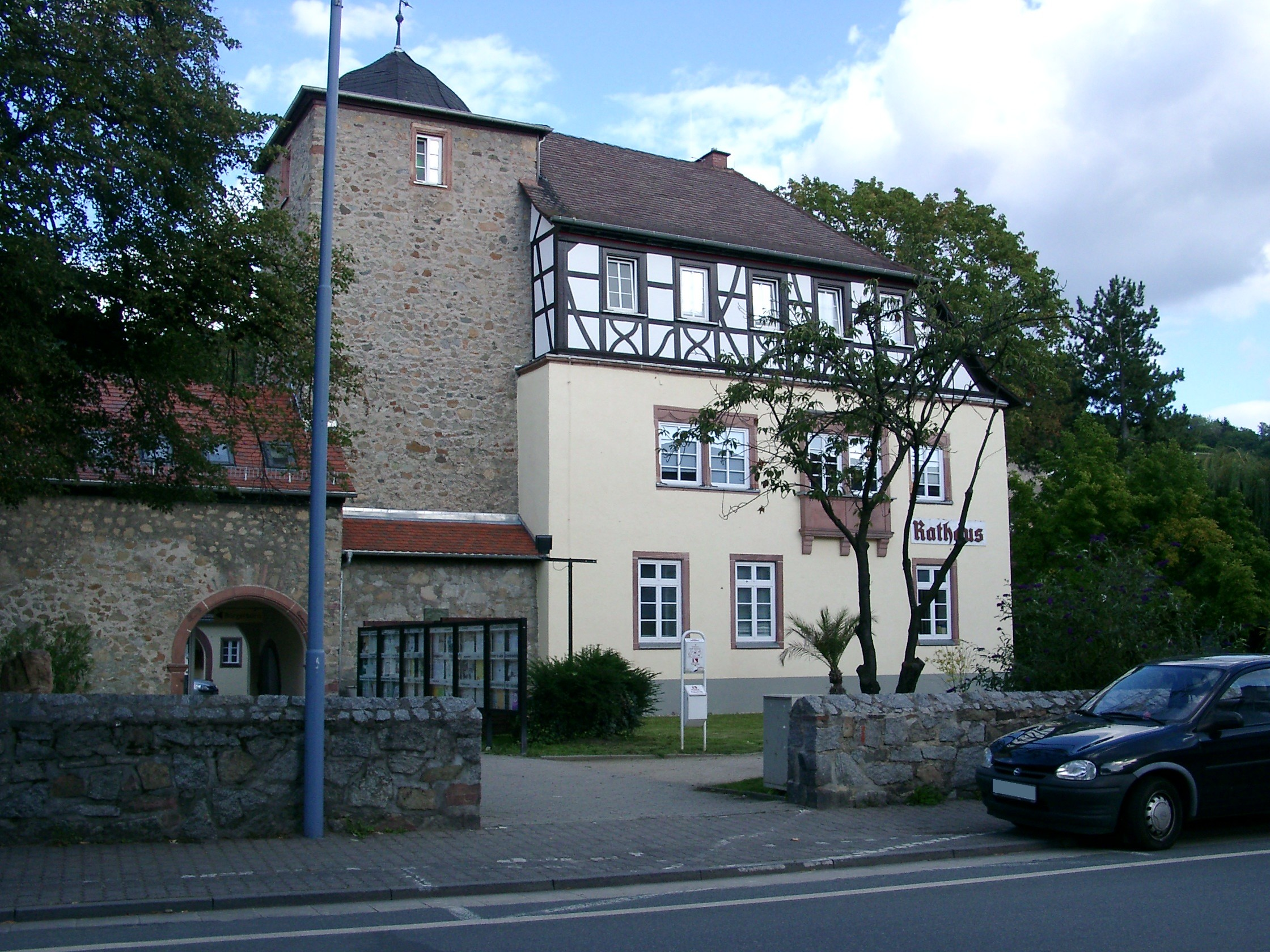 Zwingenberg (Bergstraße), Rathaus